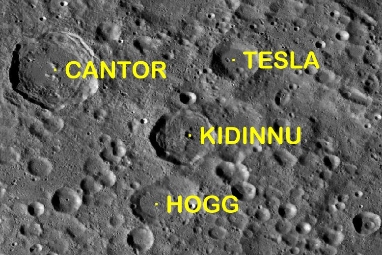 Cráter lunar Hogg. Localización. (Imagen LRO)